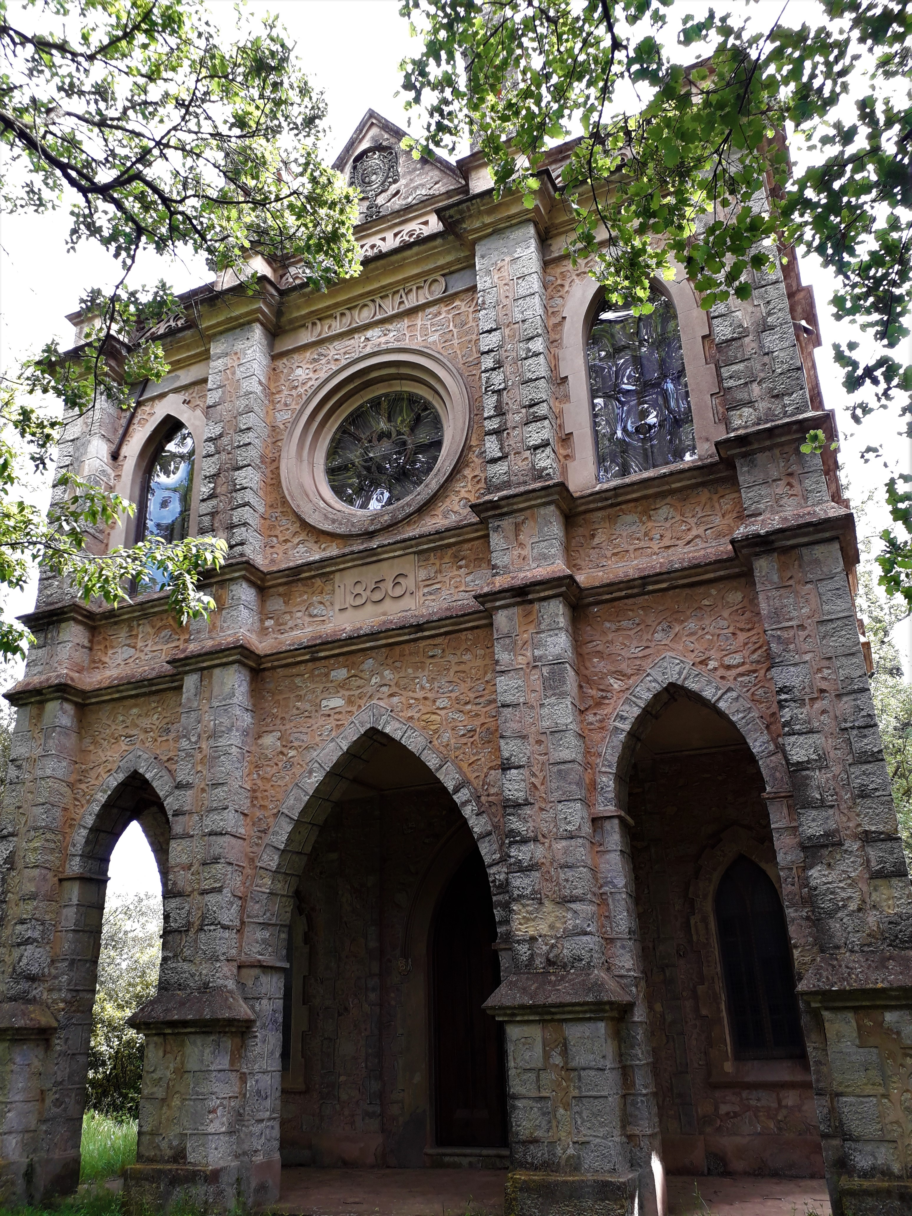 Grasse Chapelle Saint-Donat